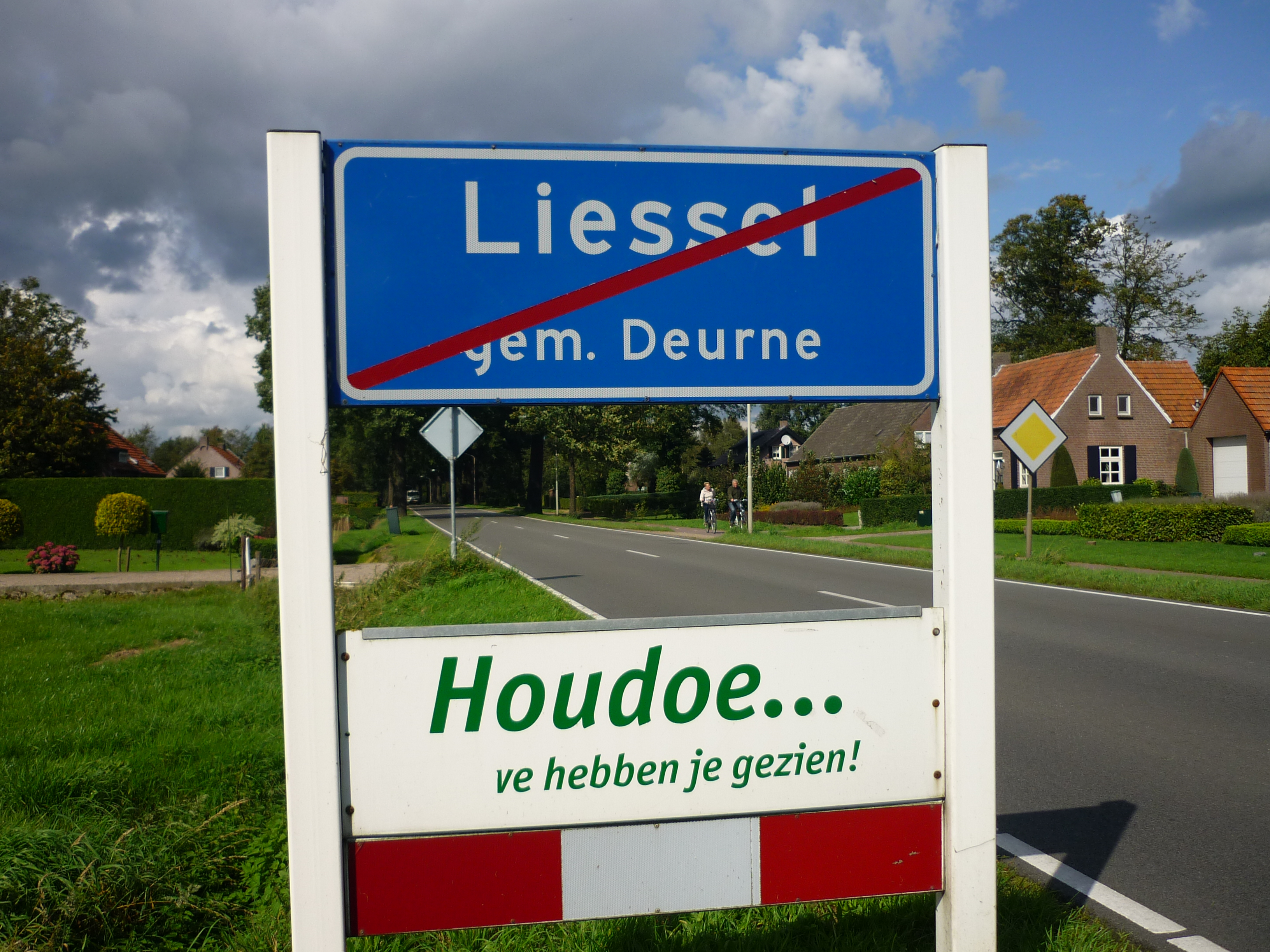 plaatsnaambord van kerkdorp Liessel met tekst